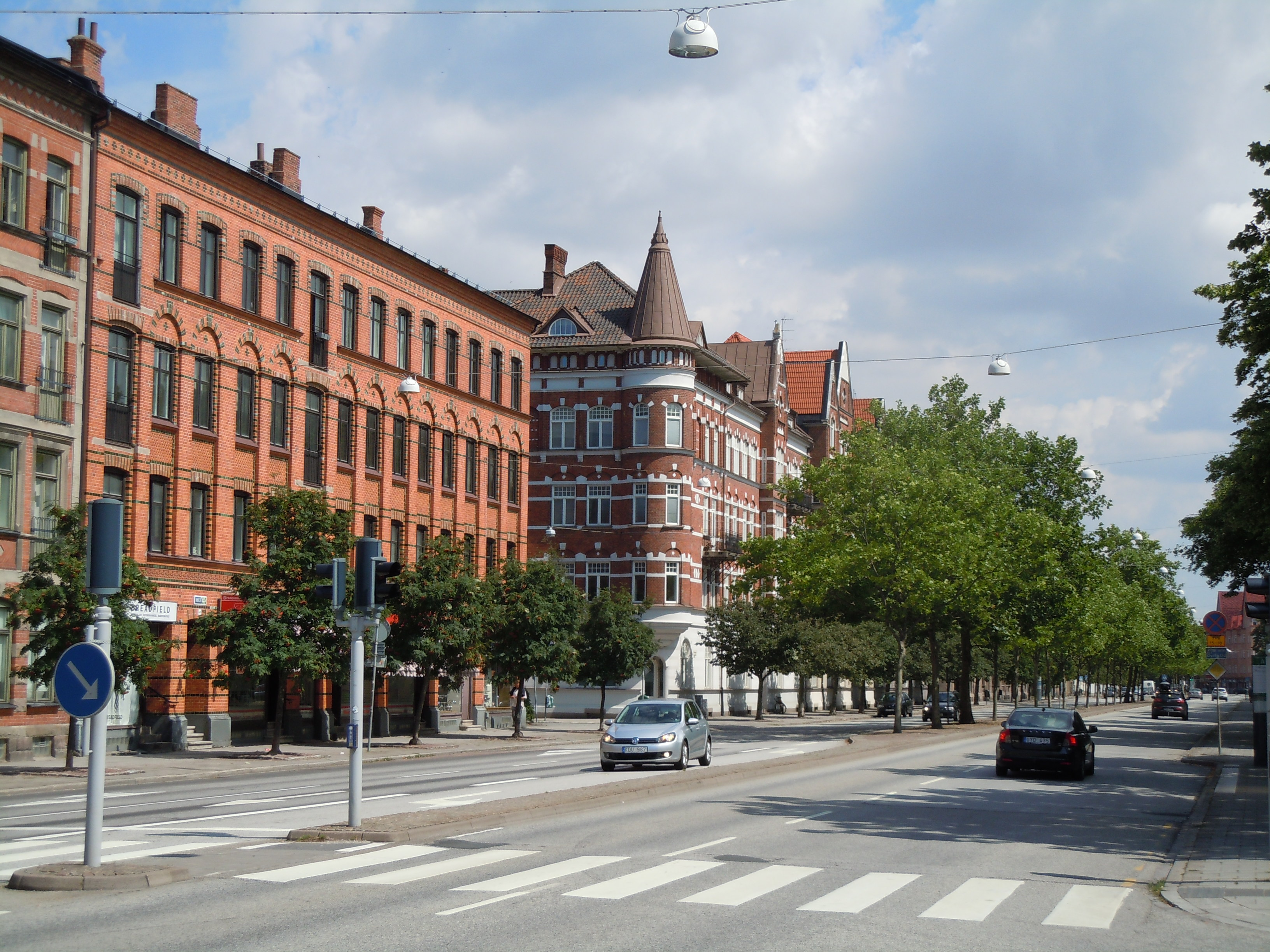 Föreningsgatan korsningen Disponentgatan Malmö This is a contemporary depiction of the image at (Föreningsgatan som löper genom Rörsjöstaden. 1950-1954.). This image was uploaded as part of the competition (Then and Now). English | Svenska | +/−